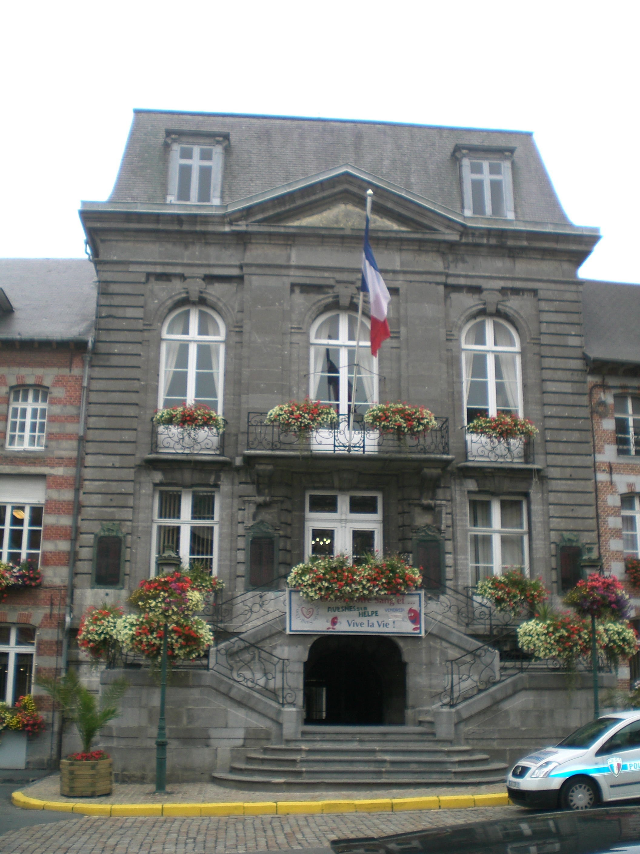 mairie d' Avesnes-sur-Helpe nord france